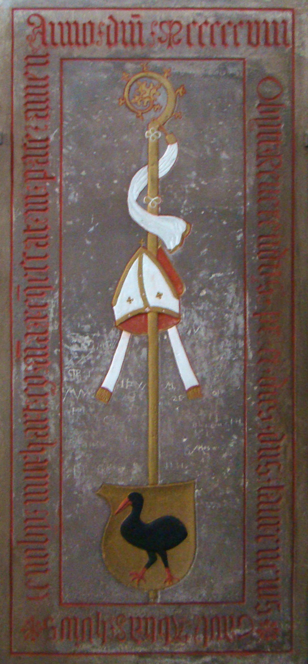 Grabplatte des Abtes Lorenz Gaul in der Stadtkirche Murrhardt, datiert MCCCCCVIII (1508), siehe Deutsche Inschriften Online